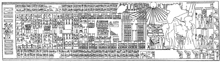 Aten temple, Meryre's tomb, El-Amarna